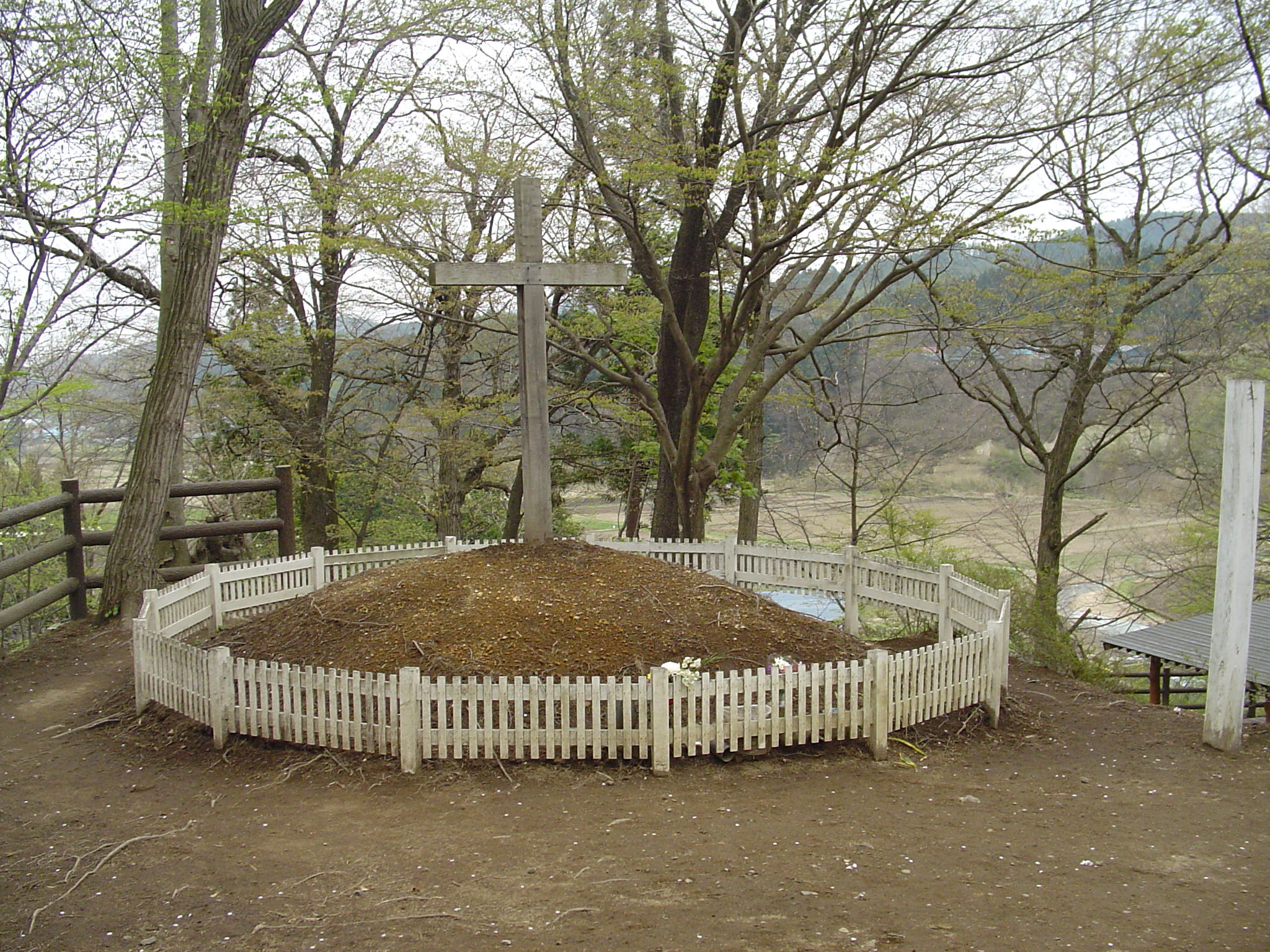 Jesus' Tomb